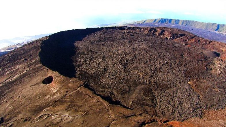 Les cratère Dolomieu du Piton de la Fournaise